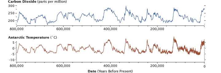 Зависност на концентрацијата на јаглерод диоксид во атмосферата од промена на температурата пред сегашно доба.